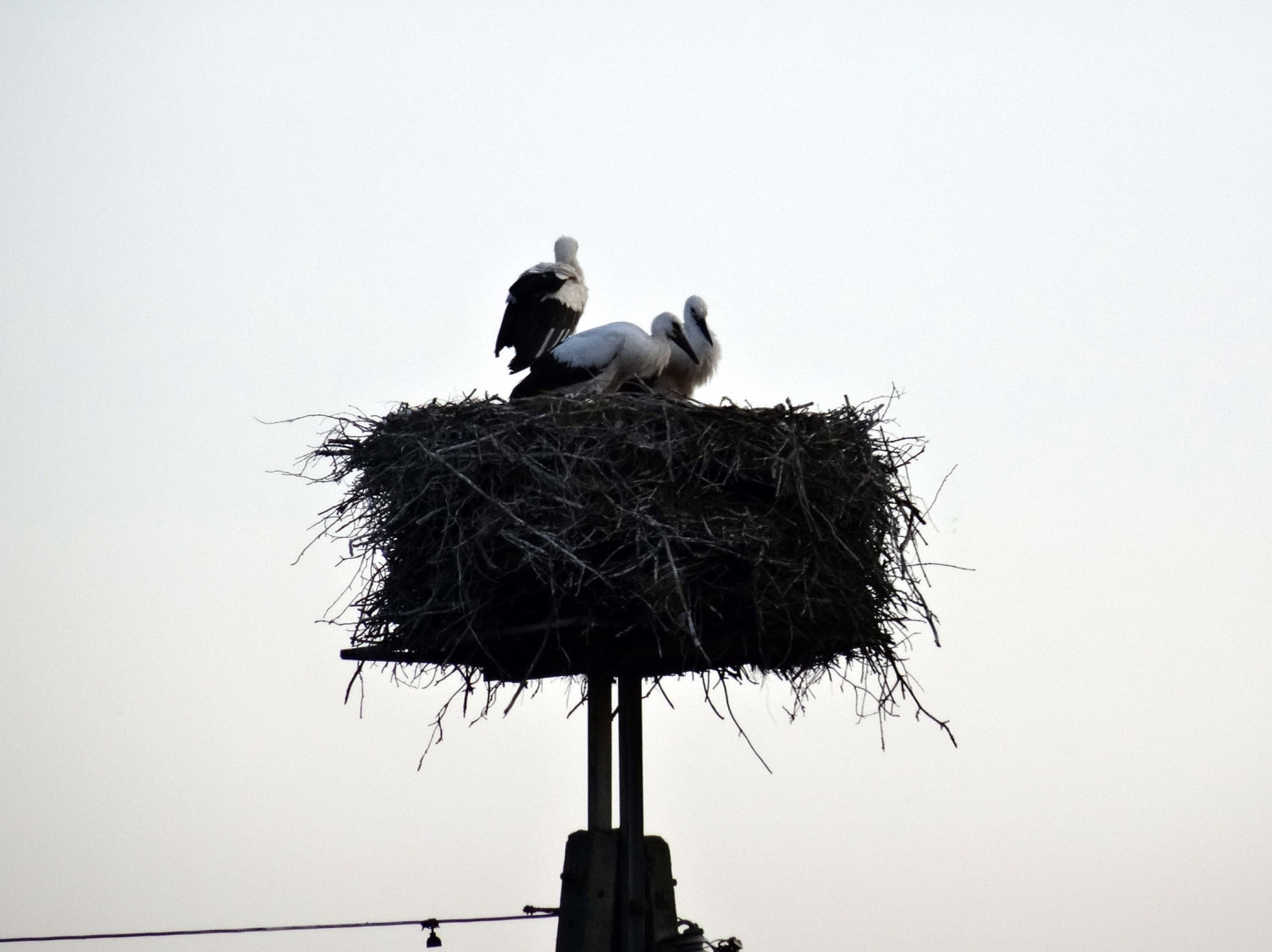 Januszkowo, gmina Nowa Wieś Wielka, powiat bydgoski